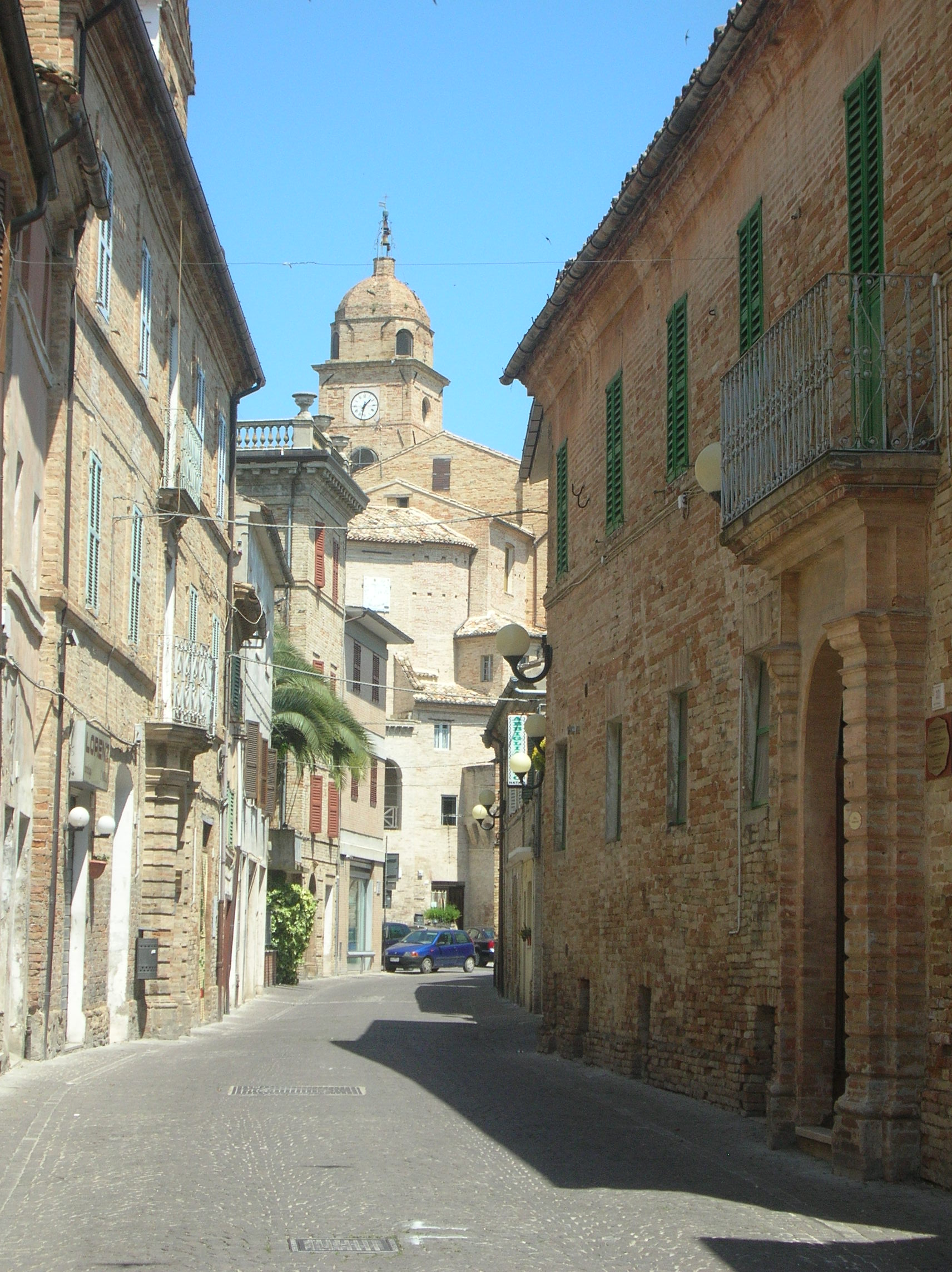 Vista di Petriolo da Corso Umberto I